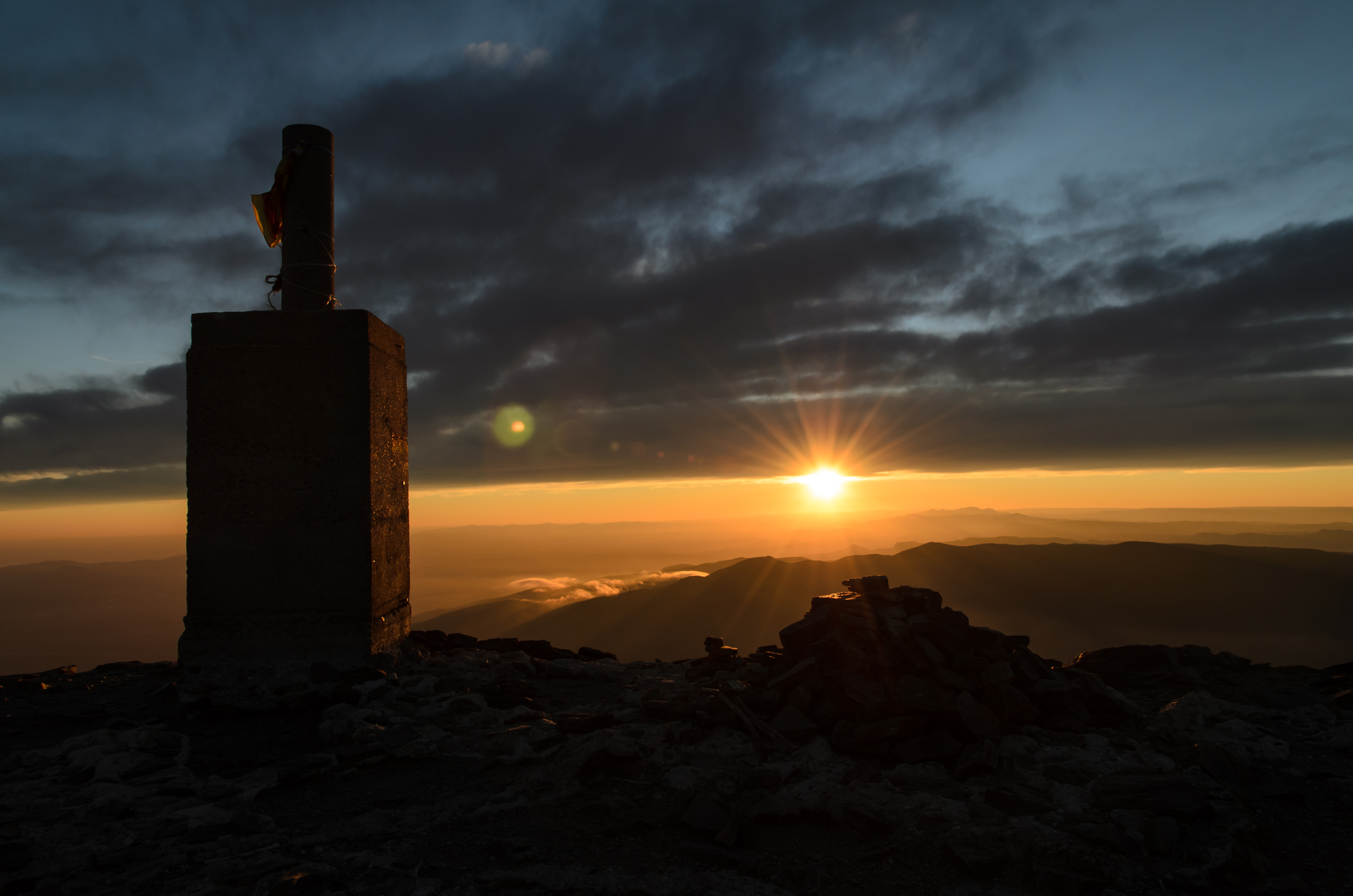 Posta de sol des de el Turó de l'Home a la tardor (Montseny) This is a a photo of an emblematic summit in Catalonia, Spain, with id: CE-295107006